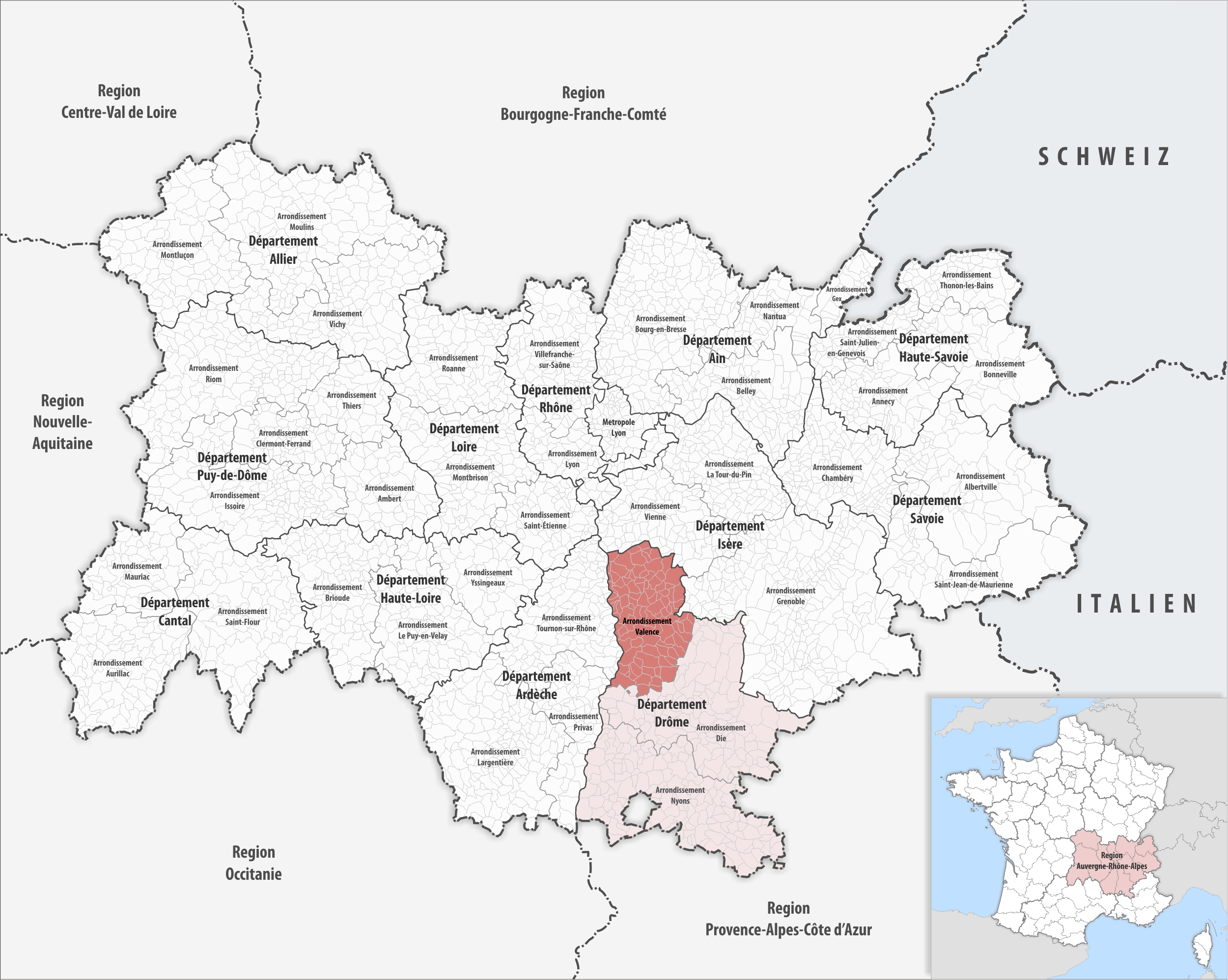 Lage des Arrondissements Valence